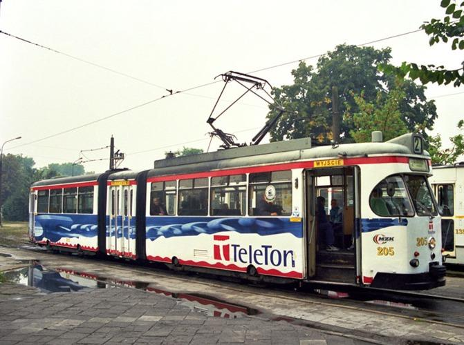 Tramwaj 4EGTW w Gorzowie Wlkp.